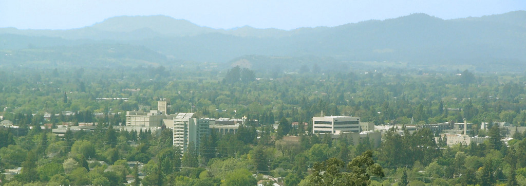 Vfiles766.jpg